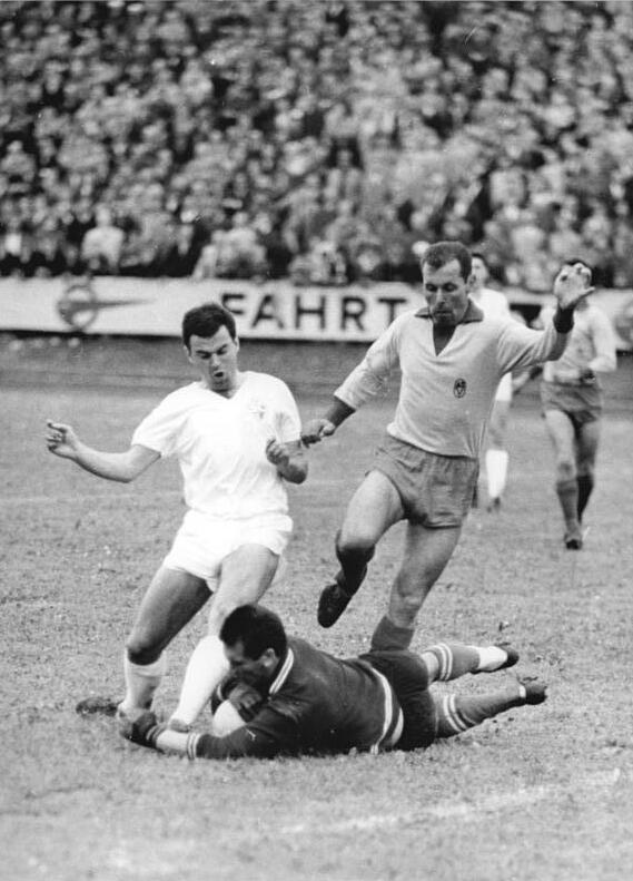 Zentralbild-Thieme stu-zi 8.6.1965 Fußball: SC Karl-Marx-Stadt - ASK Vorwärts Berlin, Karl-Marx-Stadt - ASK-Torwart Weiß (am Boden) klärt vor den angreifenden Karl-Marx-Städter-Spieler Steinmann (links). Rechts ASK-Verteidiger Unger. Am 6.6.1965 unterlag der "Neue Deutsche Fußballmeister" ASK Vorwärts Berlin dem SC Karl-Marx-Stadt vor 10.000 Zuschauern mit 1:0 Tore."